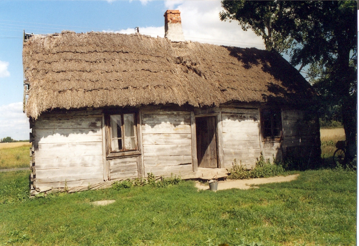 Antosin - chałupa ze strzechą